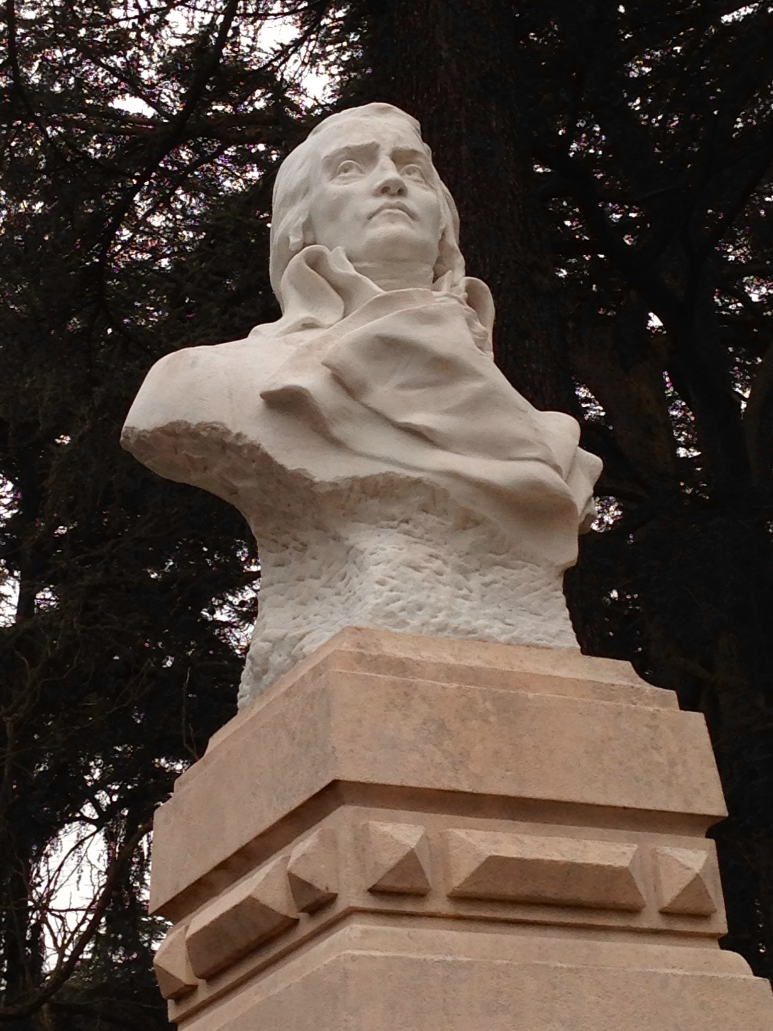 Le savant et général de la Révolution Jean-Baptiste Meusnier, statue d'Henri Varenne.